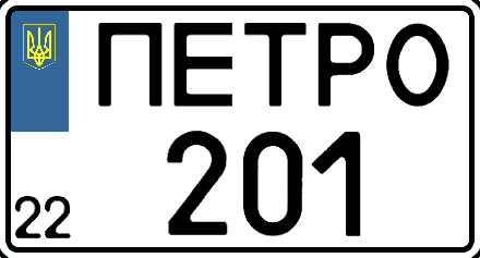 Индивидуальный автомобильный номер Украины для нестандартного места крепления модификации 2015 года